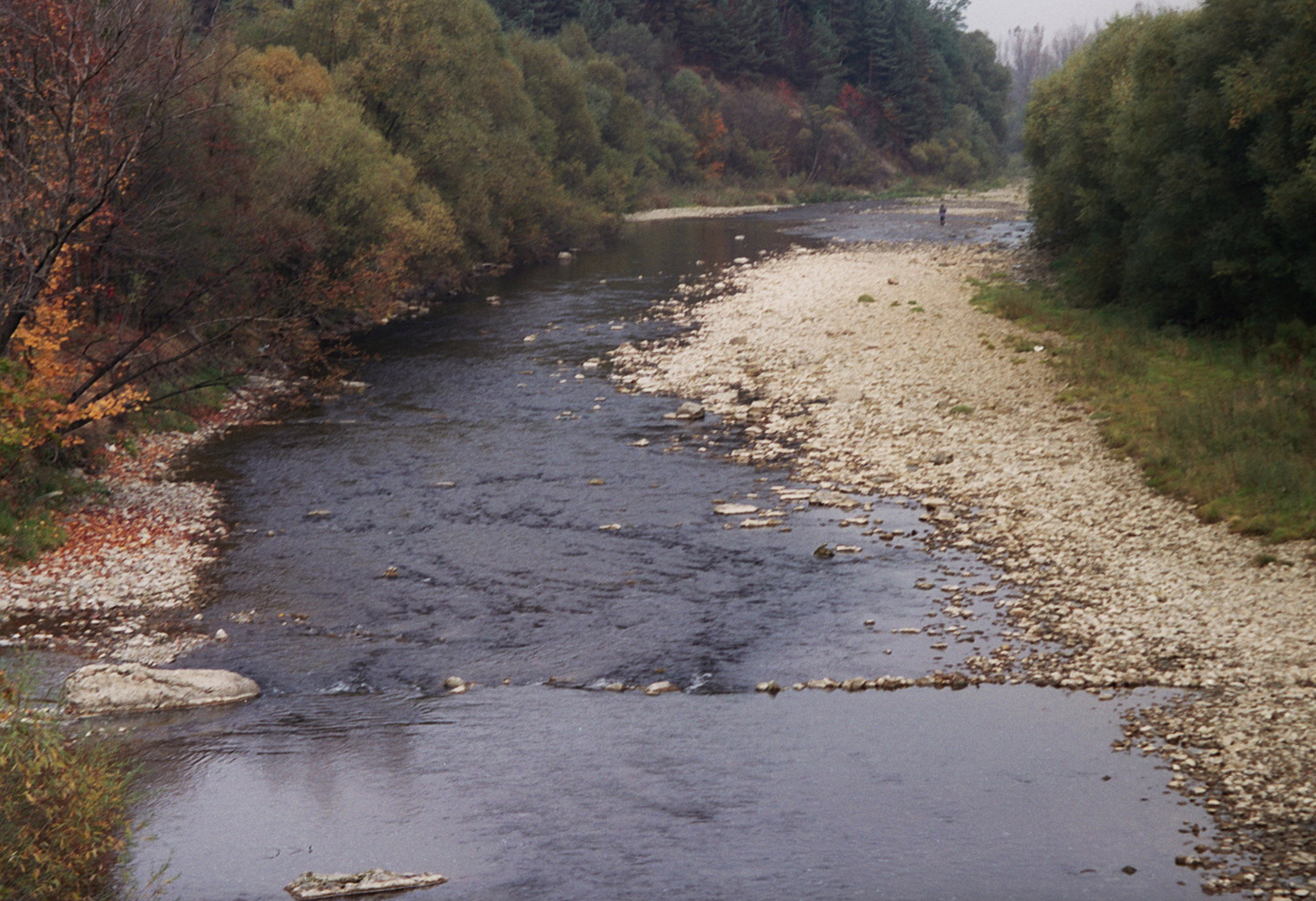 Budowa drogi ekspresowej s69 w Milówce Author: Przykuta Date: October 2005